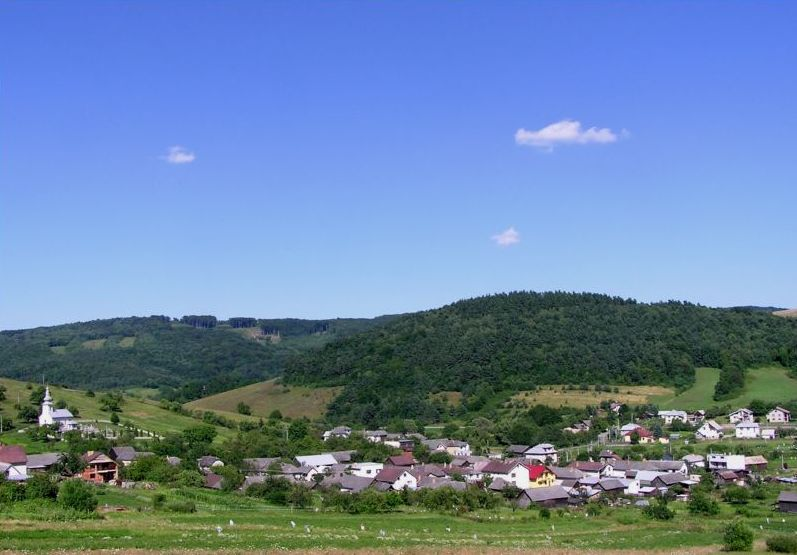 Celkový pohľad